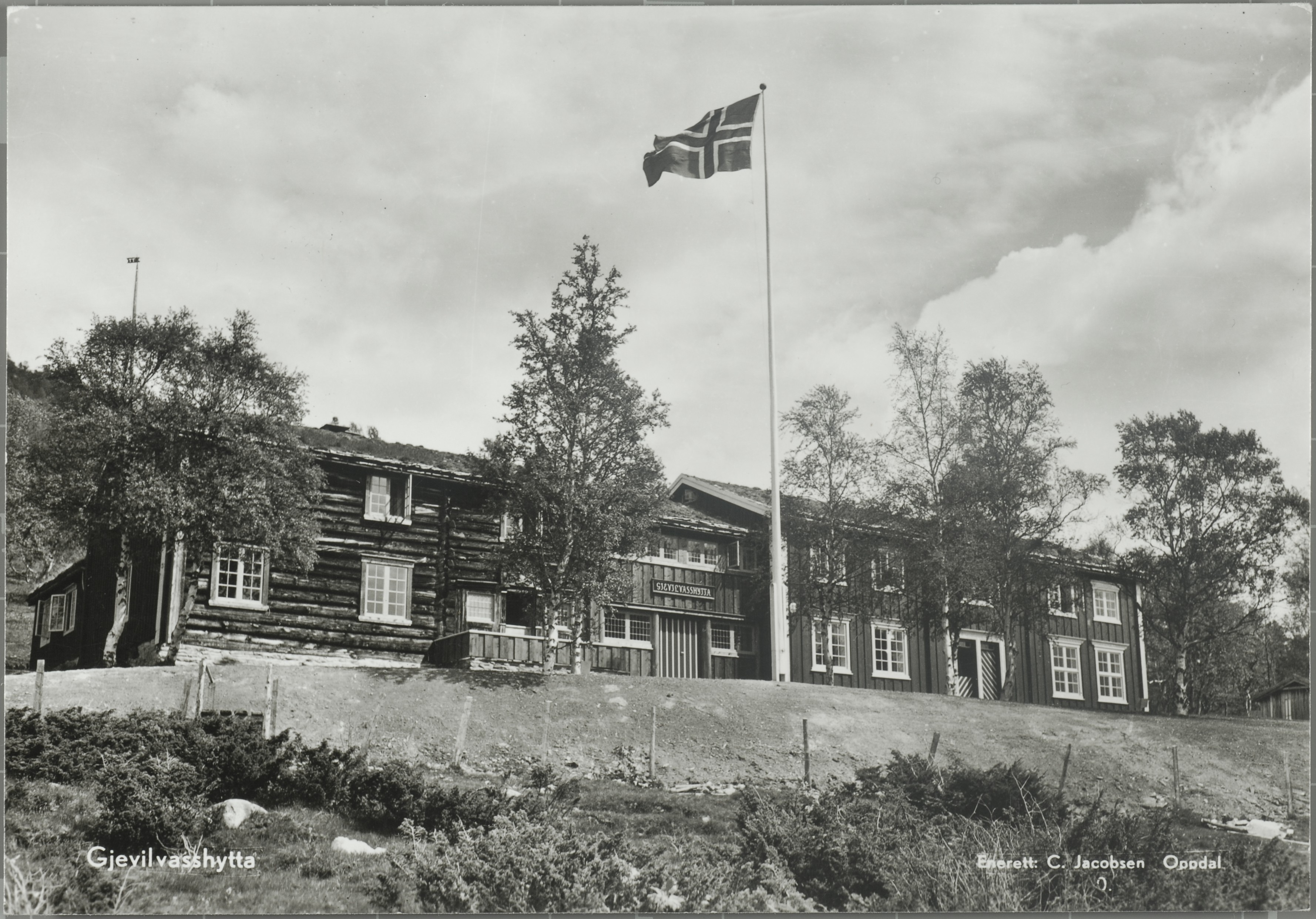 Gjevilvasshytta in Oppdal, Norway